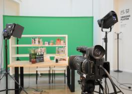 Ubikekeko platoa